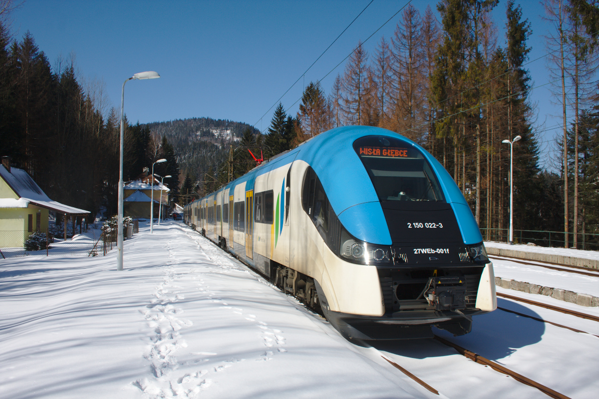 Elektryczny zespół trakcyjny 27WEb-001 w malowaniu przewoźnika Koleje Śląskie na stacji kolejowej Wisła Głębce. Pociąg w drogę powrotną wyruszy za 6 godzin.